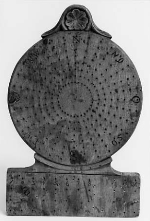 Pinnkompass med påskrift Petrine 1881